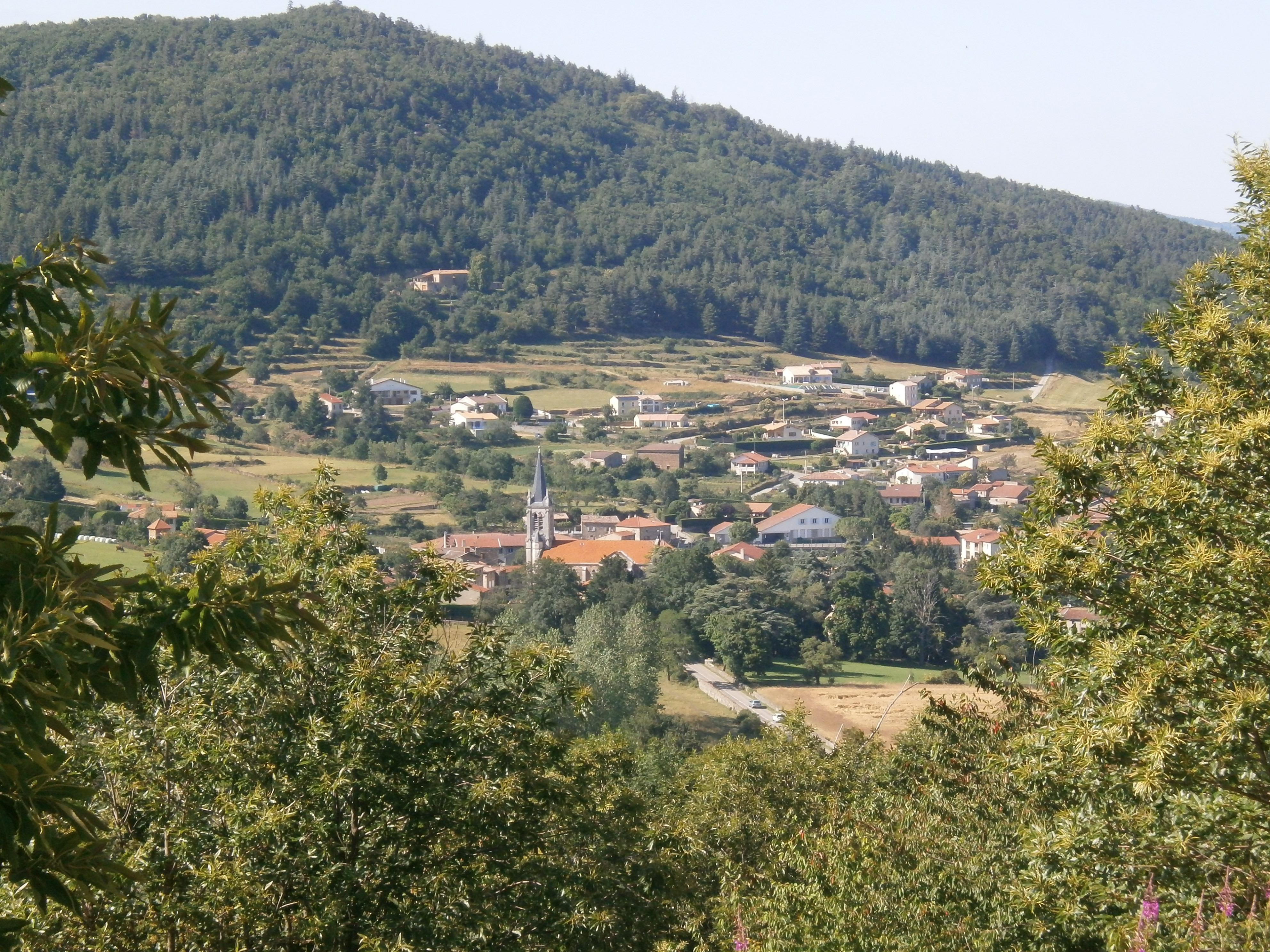 Saint-Alban-d'Ay, vue générale.